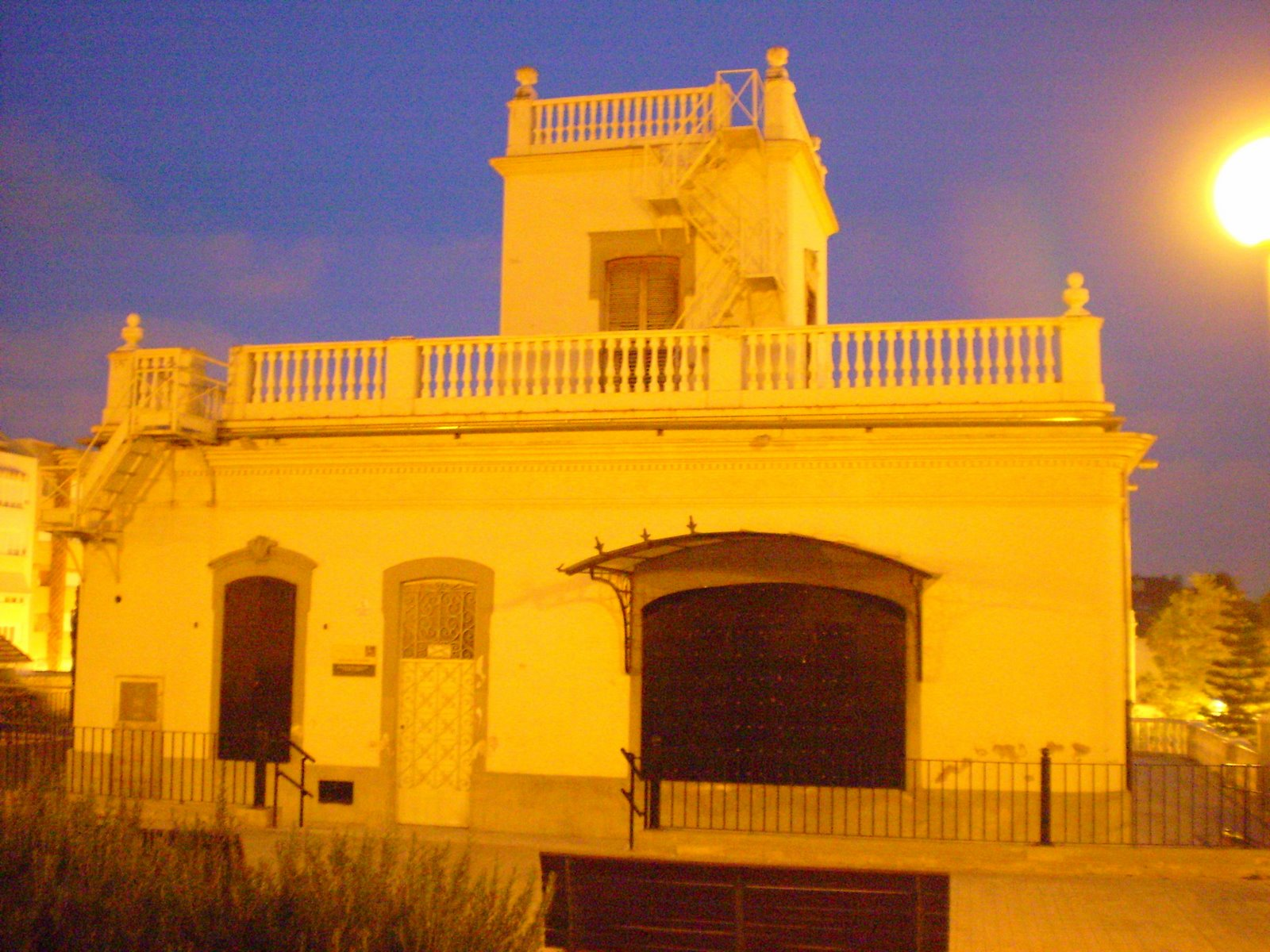 Benimamet: Biblioteca Teodoro Llorente tiene entradas por la calle Campamento y por la Calle Fortaleny